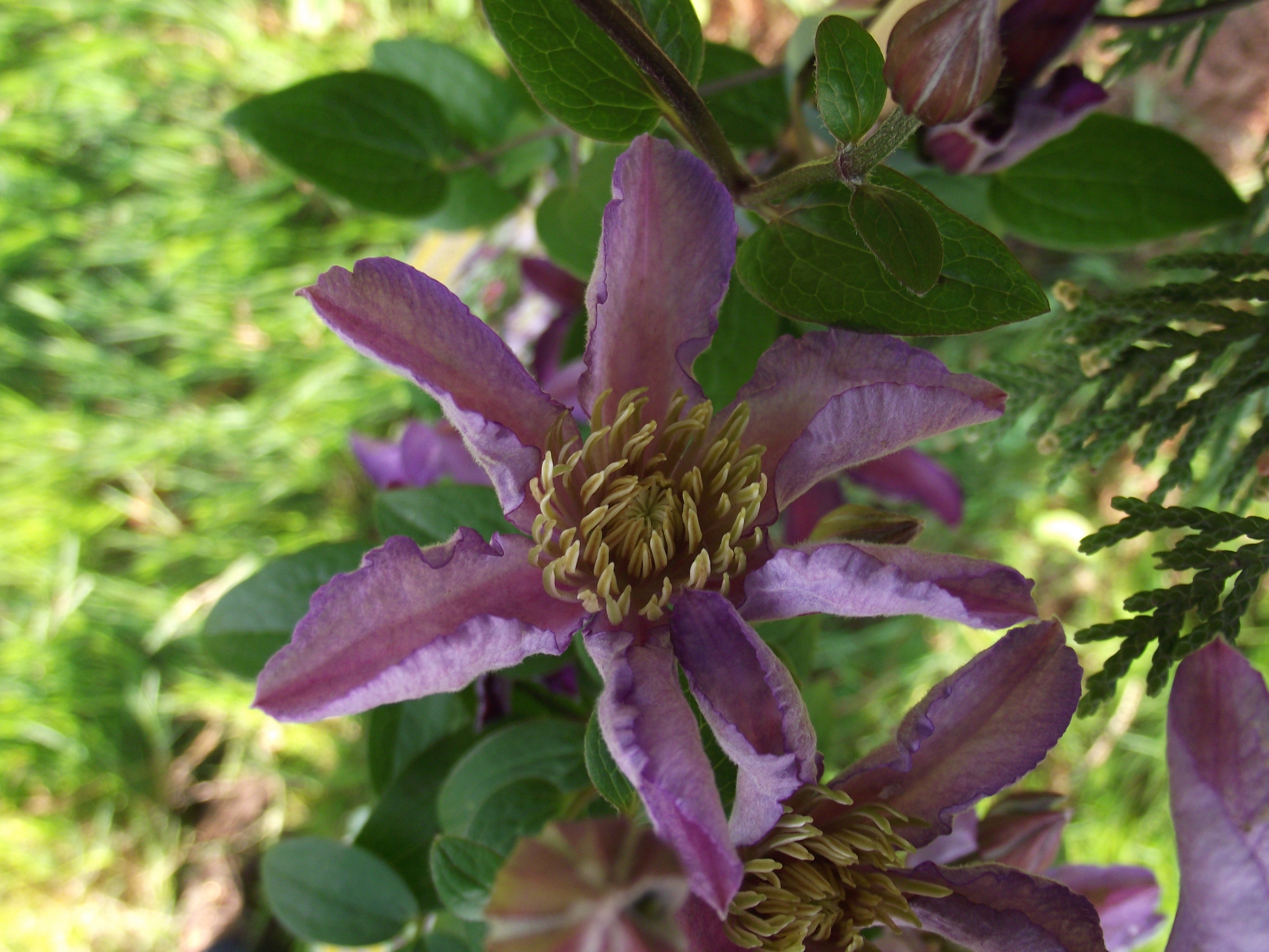 clematite exciting zoexci 2